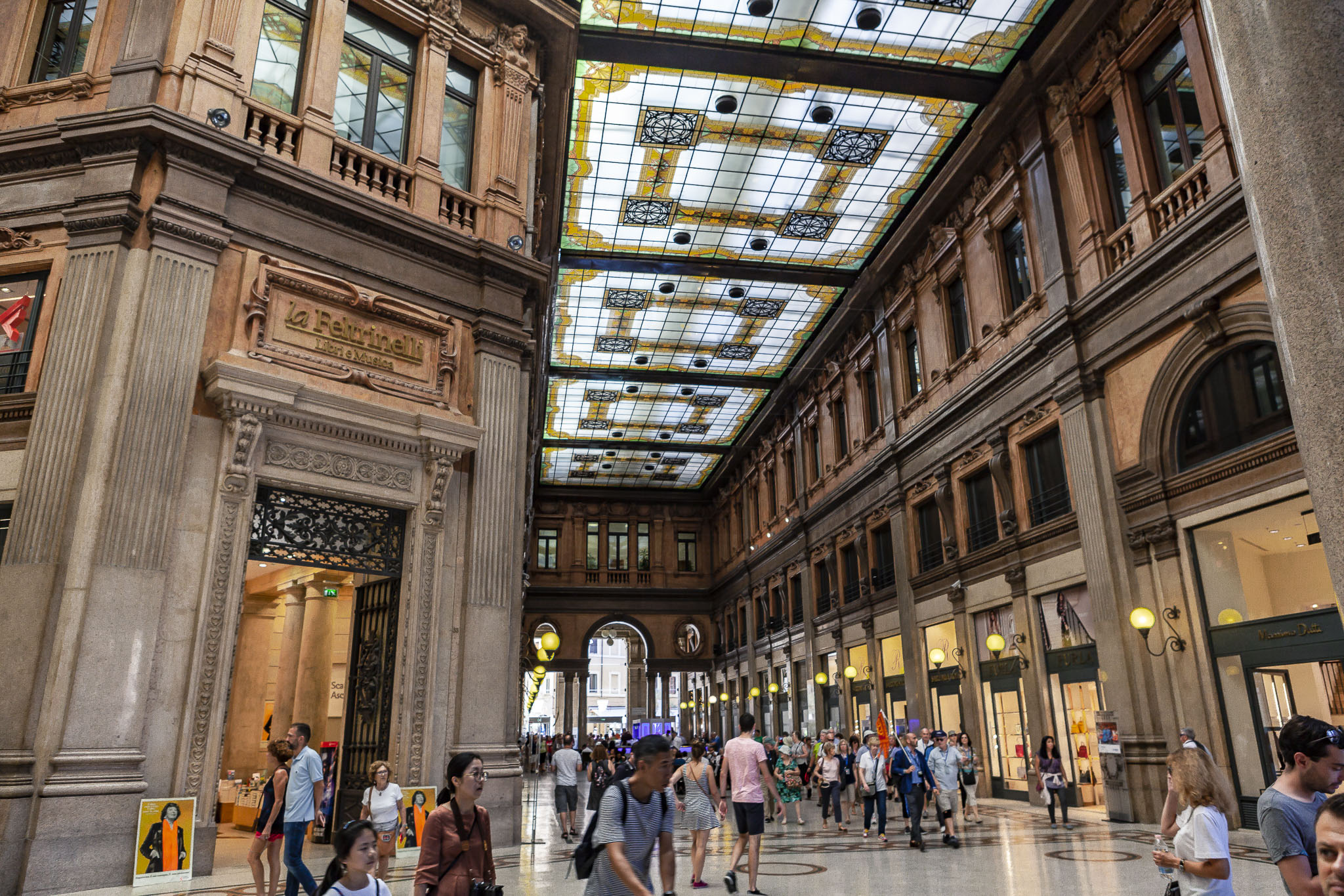 Galleria Alberto Sordi, interno ala sud This is a photo of a monument which is part of cultural heritage of Italy.